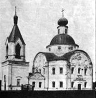 Троицкая церковь в селе Любутском (1684?)